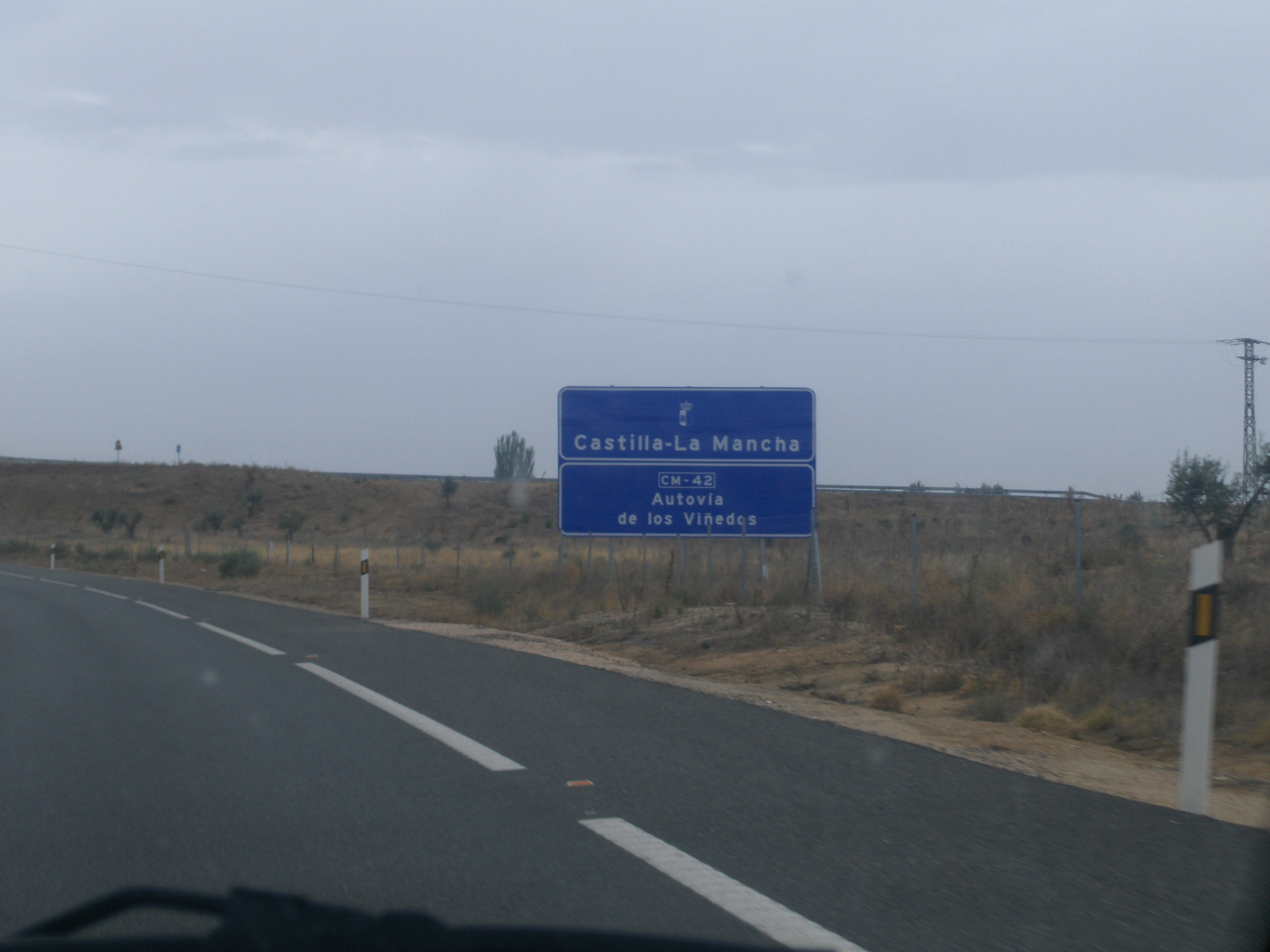 Cartel de la autovía CM-42, en la provincia de Toledo